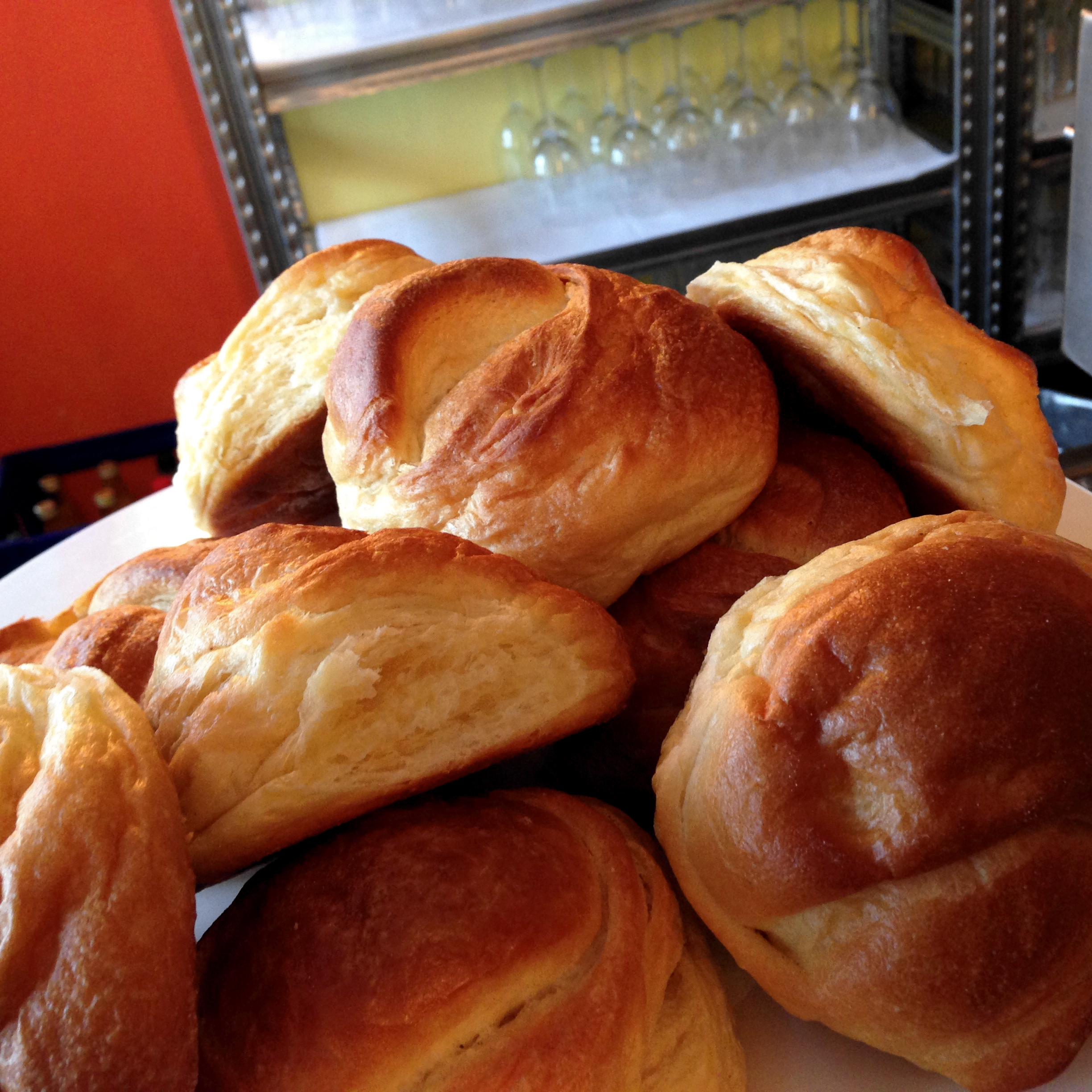 eastern german "splitterbroetchen" ("splinter bread rolls", referring to "splinters" of butter in the dough); pic taken in restaurant LUXEMBURG on rosa-luxemburg-platz in berlin-mitte (formerly eastern berlin)